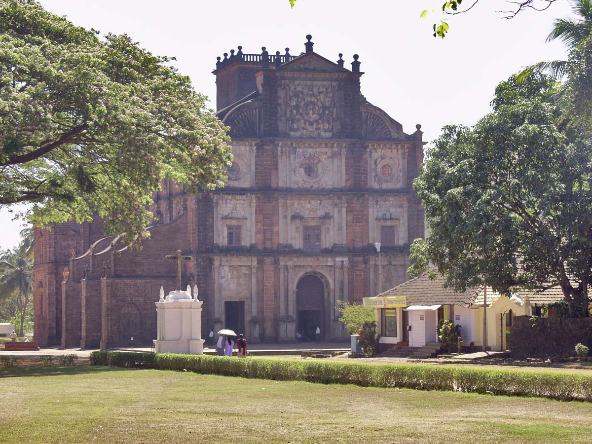 Basilica Do Bom Jesus, Goa Velha, India. Danny Burke